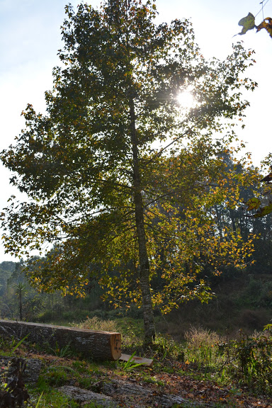 arbol endemico del bosque mesofilo